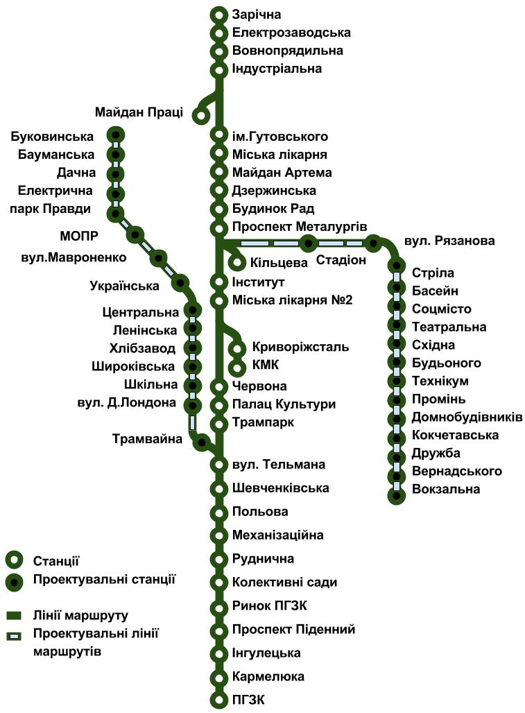 карта схема проекта скоростного трамвая Кривого Рога